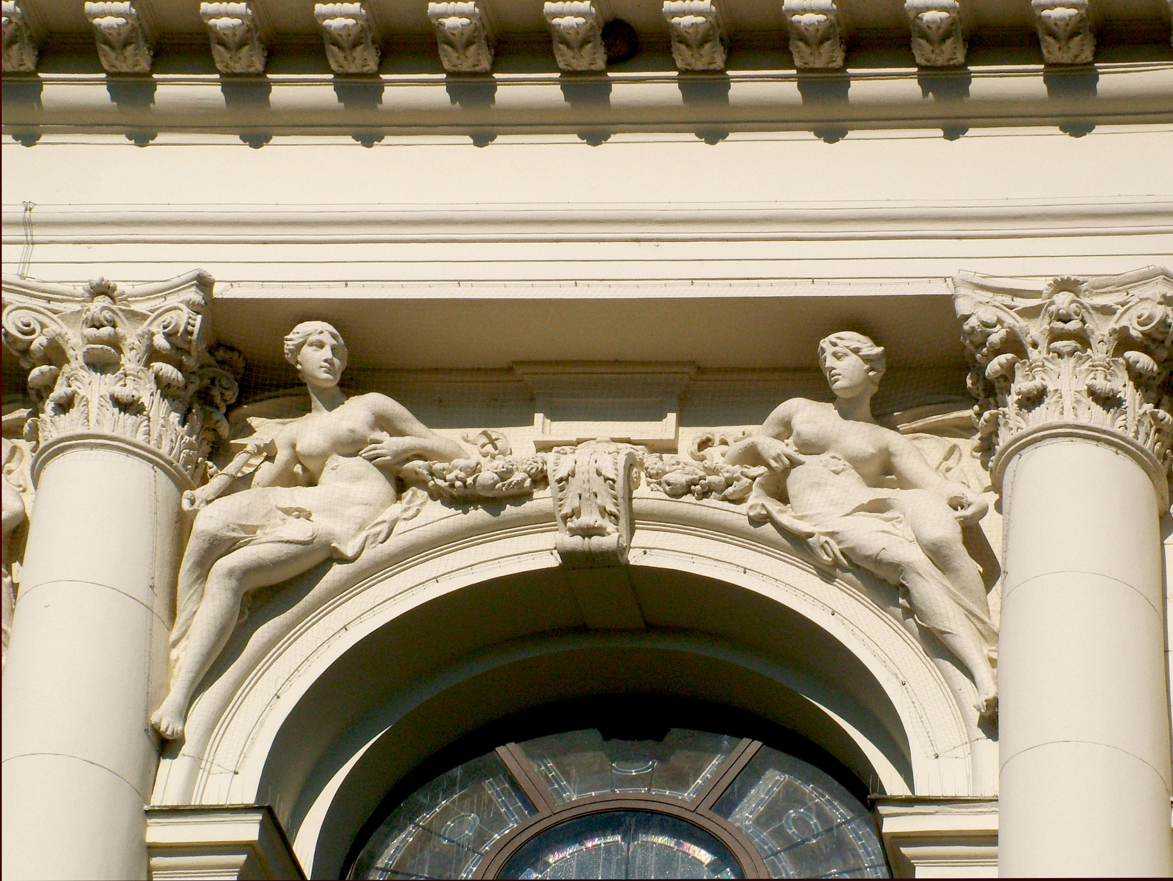 Veszprémi megyeháza homlokzati szobordísze (Róna József munkája)